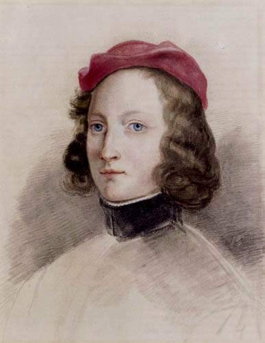 Louise Seidler: Porträt der Malerin und Bildhauerin Louise Freiin von Meyern-Hohenberg (1815–1965).